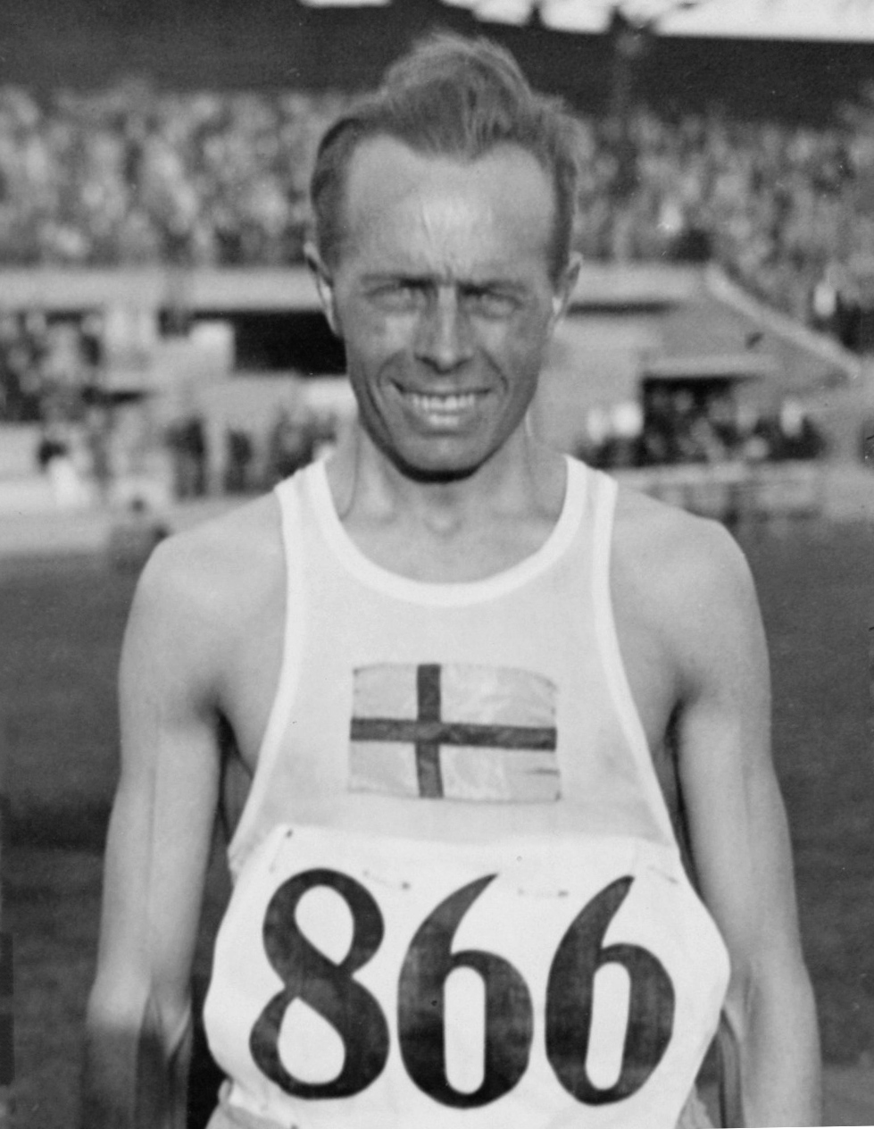 Sport. Sport, Olympische Spelen Amsterdam, 1928 : De Zweed Edvin Wide, winnaar van brons op de 5000 m hardlopen